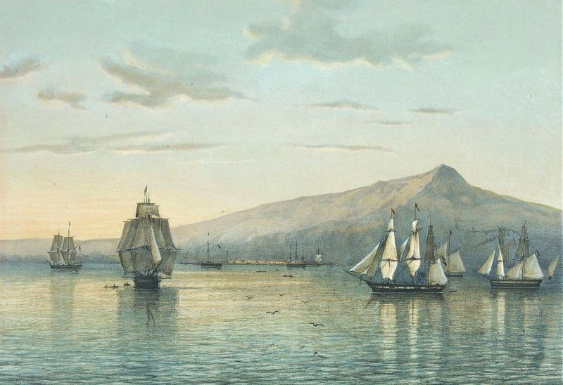 Litho. Naar een tekening van Abraham Salm.. Noordkust van Java